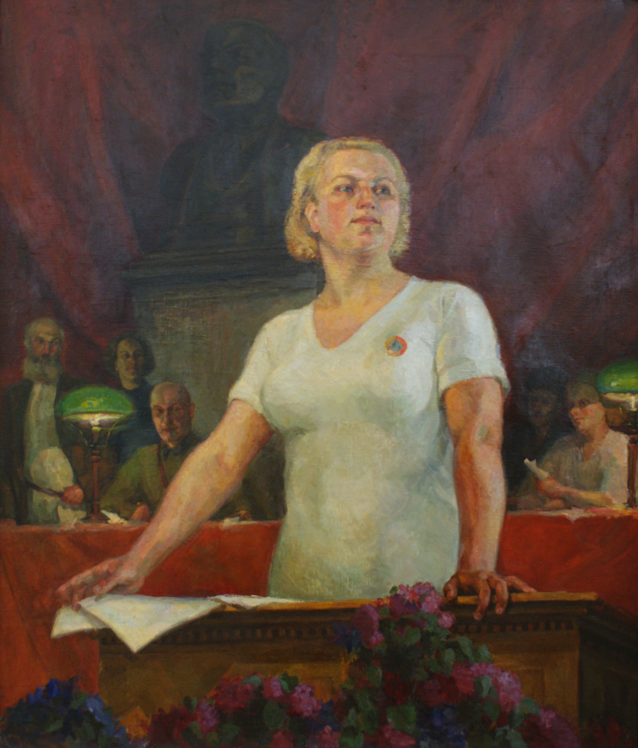 Выступленне стаханаўкі. Палатно, алей